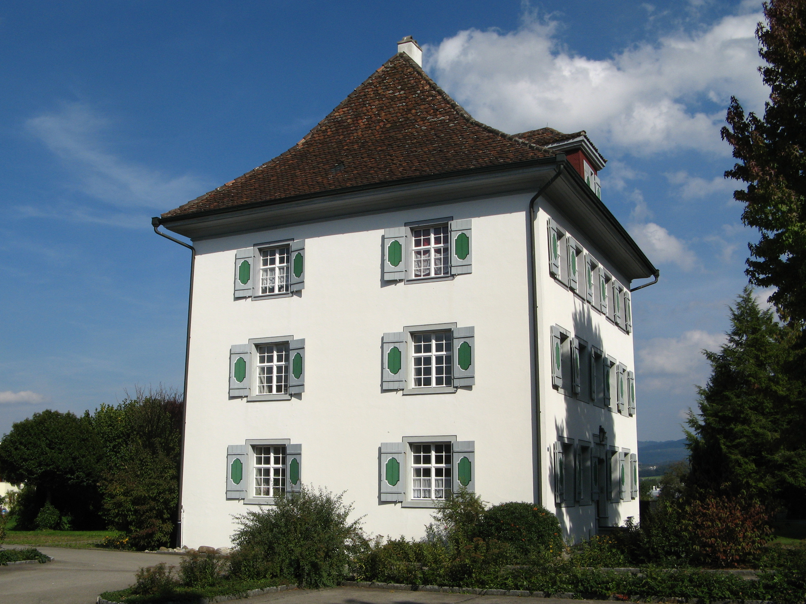 Kaplanei Merenschwand (römisch-katholisches Pfarrhaus)